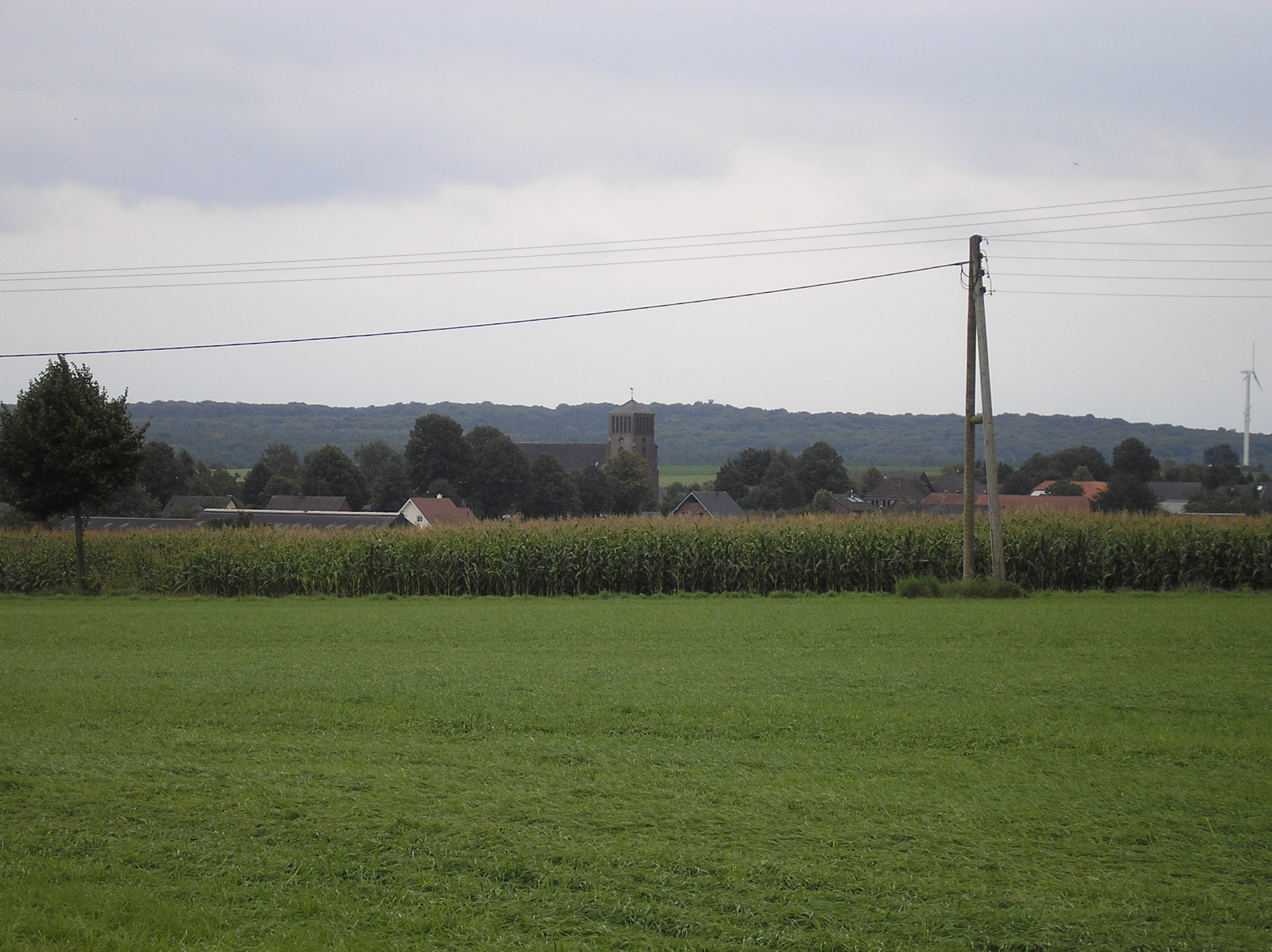 Blick auf Frasselt von Nordwesten, in der Bildmitte die St. Antonius-Kirche, im Hintergrund der Reichswald